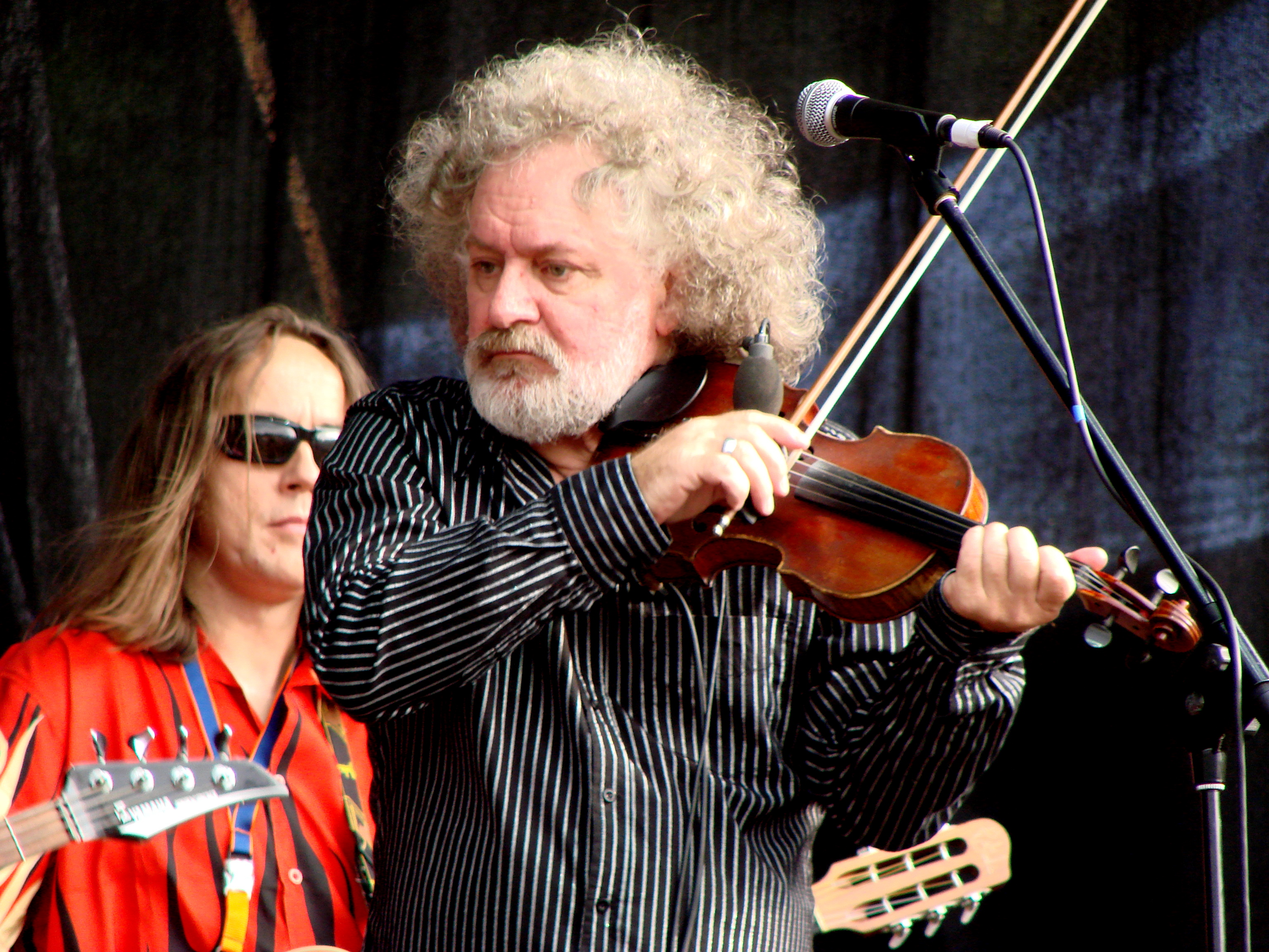 Festiwal odbył się w dniach 30-31 lipca 2010 w Chorzowie na terenie Pól Marsowych w WPKiW, na skrzypcach gra Jan Błędowski, za nim na gitarze gra Witold Jąkalski